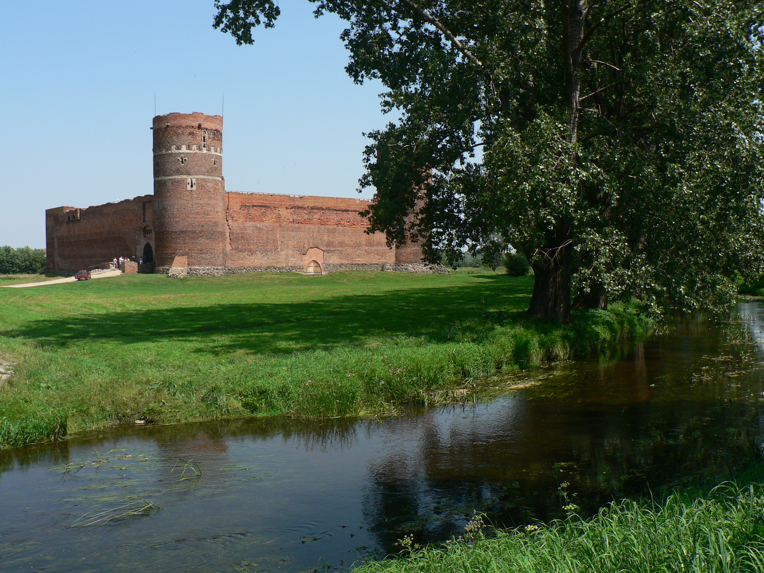 Zamek Książąt Mazowieckich w Ciechanowie oraz rzeka Łydynia